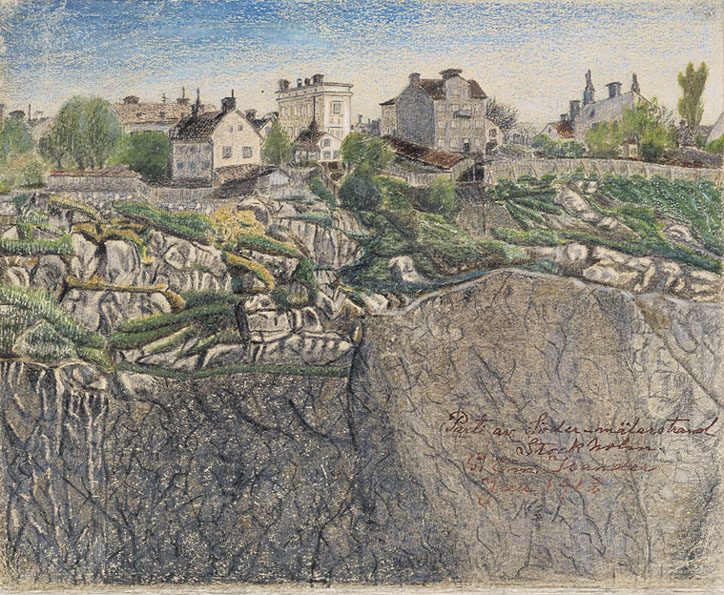 Parti av Söder Mälarstrand (Mariaberget) av Gustaf Isander, 1912. Material och teknik: Blyerts ; Krita (svart, röd, färg-) Mått i mm: 163x198